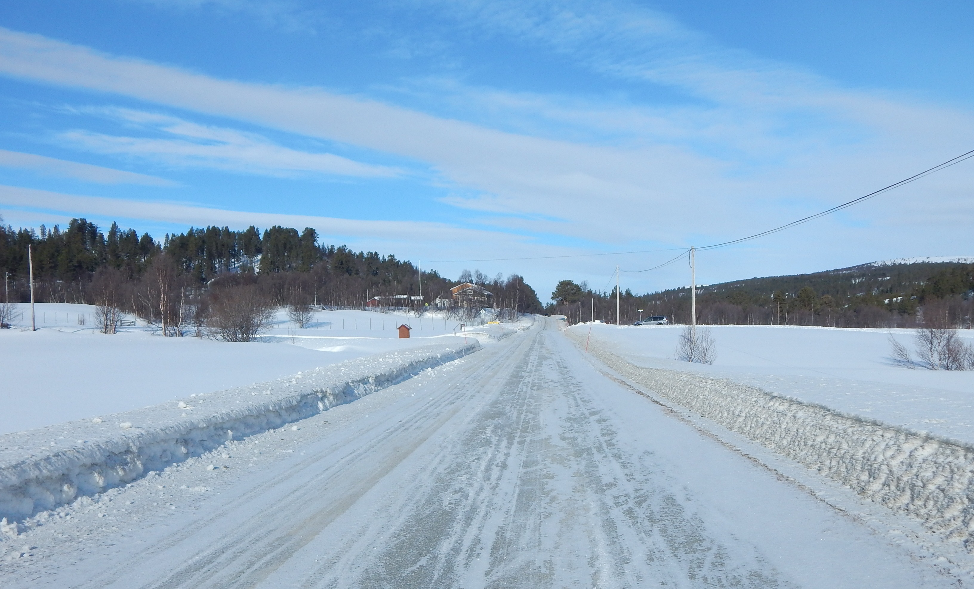 Femundsveien (fylkesvei 6526 (tidligere 532) i Hådalen